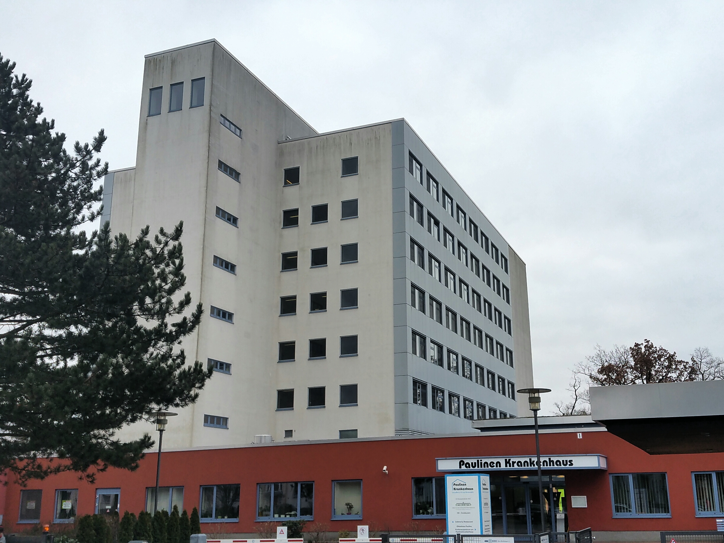 Paulinenkrankenhaus, ehemaliges Britisches Militärkrankenhaus